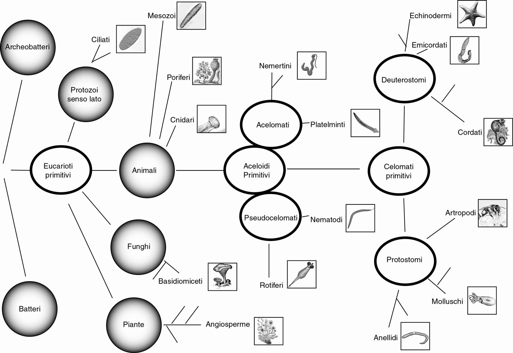 Schema semplificato dell'evoluzione della vita sulla terra con riferimento ai gruppi tassonomici più noti e rappresentativi ed ai loro nomi comuni. Alcune parti dell'immagine composta provengono da documenti di Pubblico dominio. La struttura si basa fondamentalmente su schemi evolutivi verbalmente descritti in Trattato Italiano di zoologia, B.Baccetti et al. ed. Grasso ISBN 88-7055-126-1 e P.B. Weisz Zoologia 2 ed Zanichelli, ed integrato da comuni conoscenze per quel che riguarda la base dello schema. La struttura si sviluppa per complessità crescente da sinistra a destra, tenendo conto delle relazioni filogenetiche.